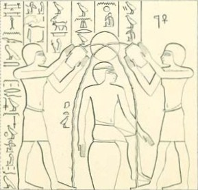 Relief an der Ostwand im Grab des Renni (EK7) in el-Kab, Ägypten